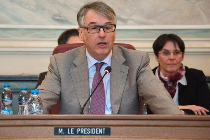 Jean-René Lecerf, Sénateur du Nord, vice-Président de la Commission des lois